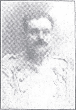 Roman de San Jose, Músic militar autor de diverses marxes encara vigents